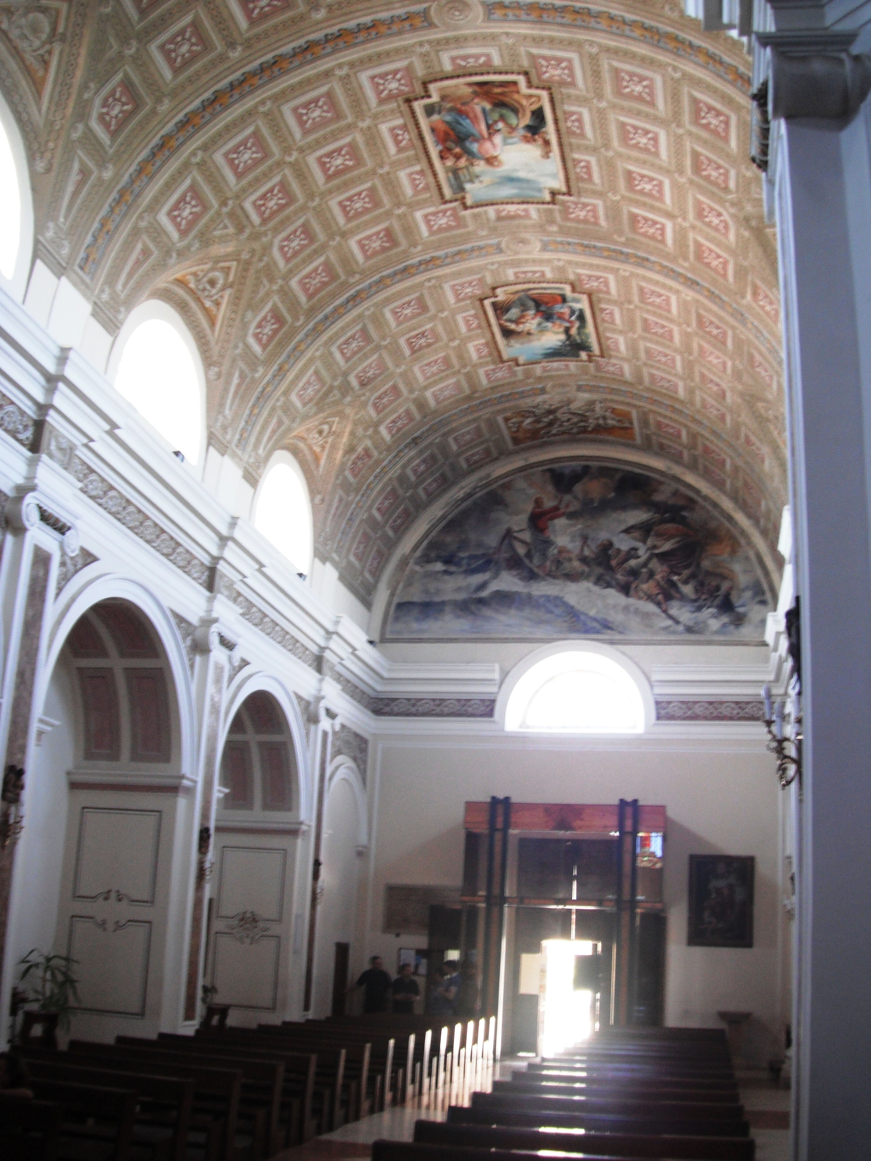 Interno della chiesa di Santo Stefano protomartire